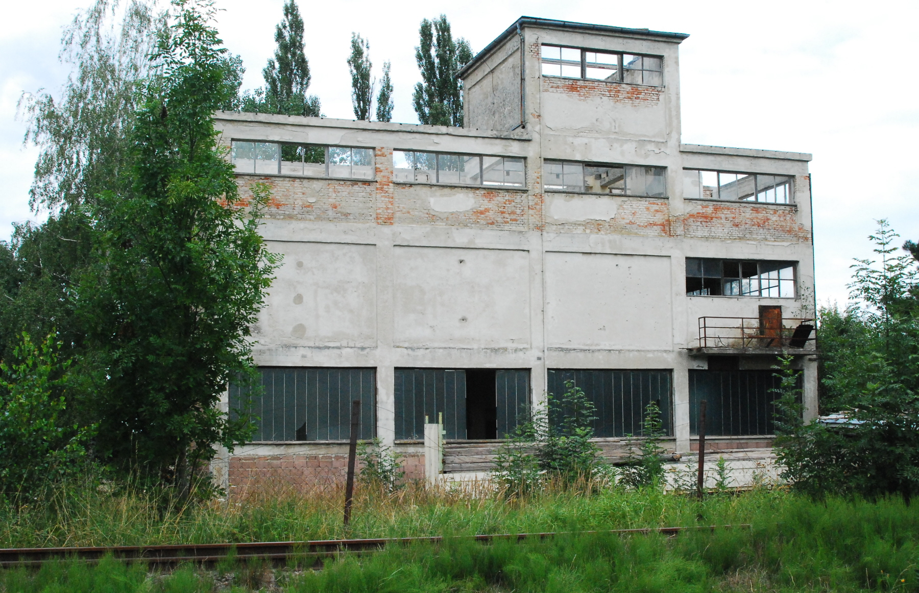 Ehemalige Sieberei des Braunkohletagbaus in Langau in Niederösterreich